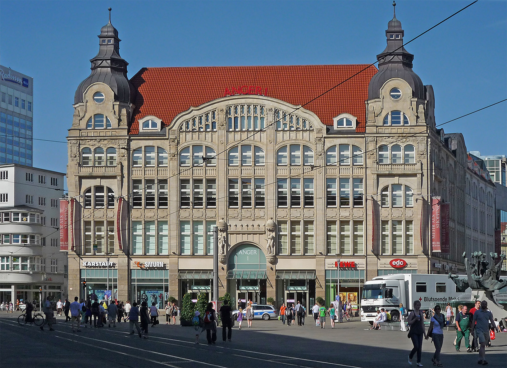 Anger 1, ehemaliges Kaufhaus Römischer Kaiser, heute Einkaufszentrum mit Karstadt-Warenhaus